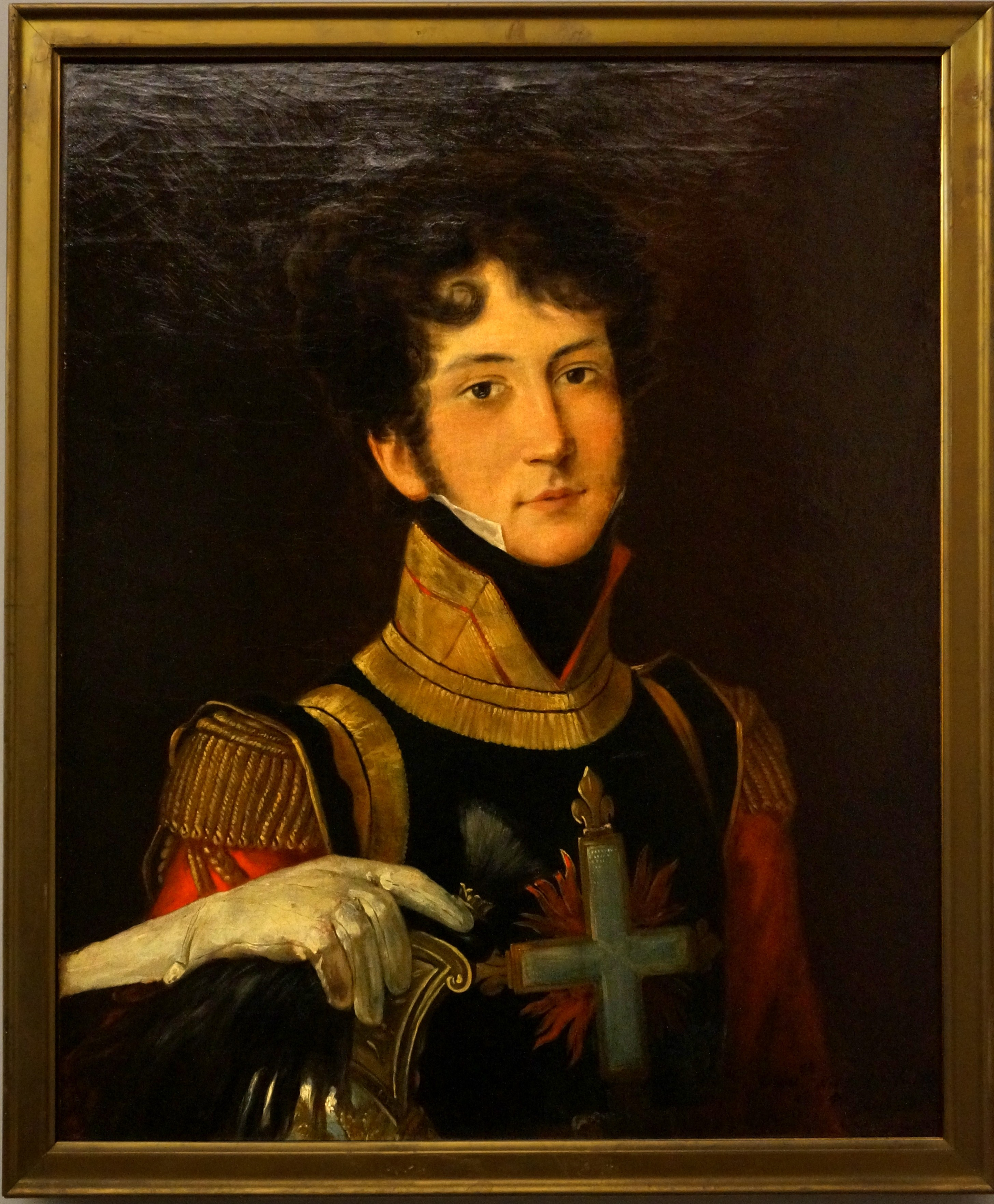 tableau au Musée de l'armée. Inv. 2185, Ec 251